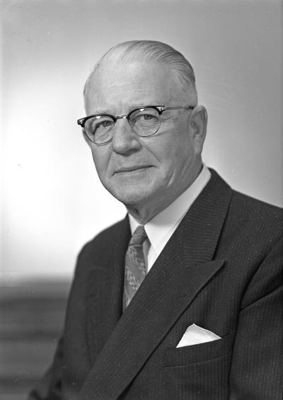 Lieutenant Governor Anderson, 1955